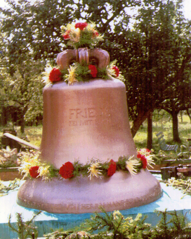 Glocke der alt-katholischen Pfarrkirche St. Peter und Paul - "Friede sei mit euch"